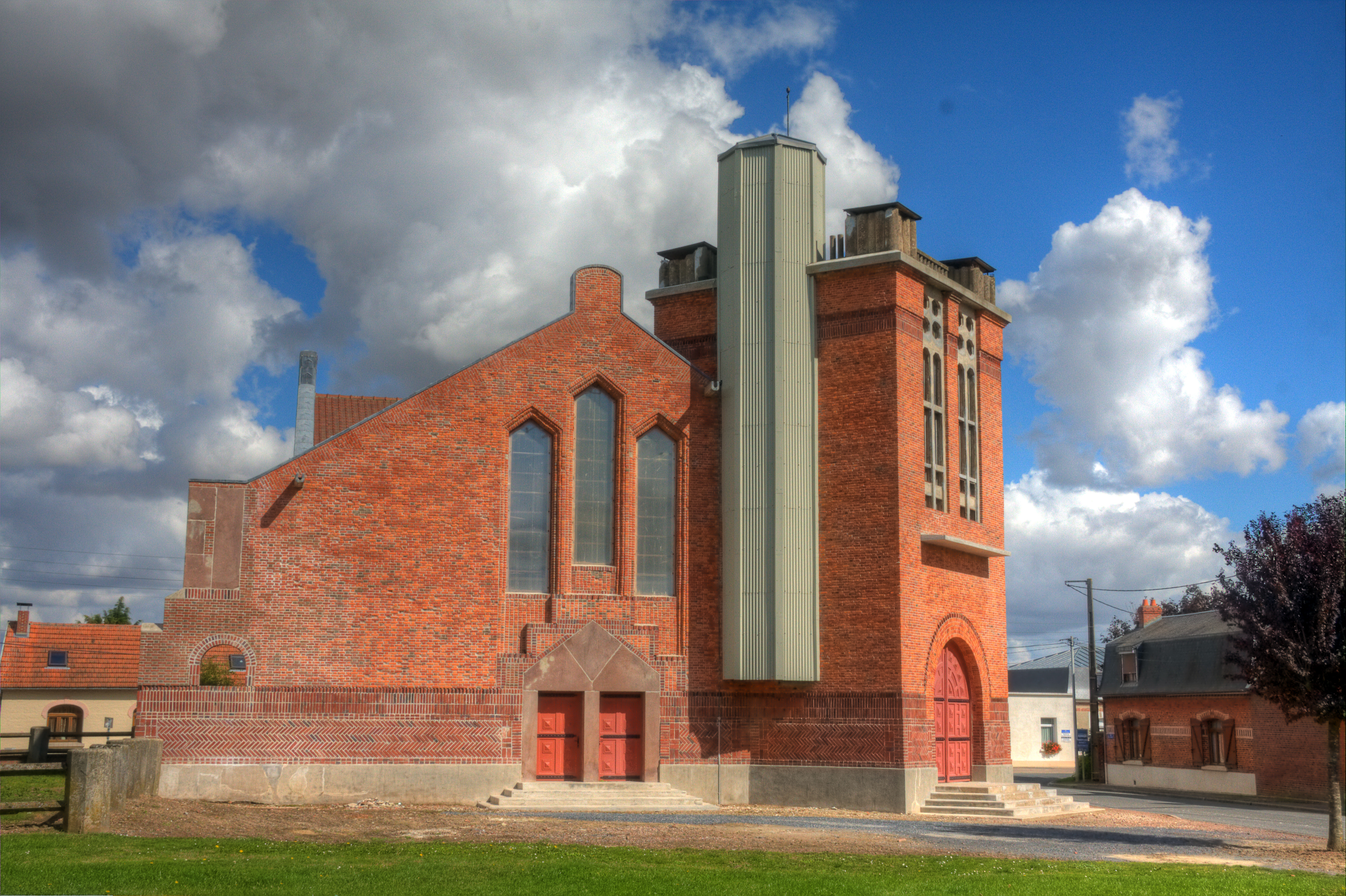 L'église de Rocquigny, clocher de béton arasé en 2002.